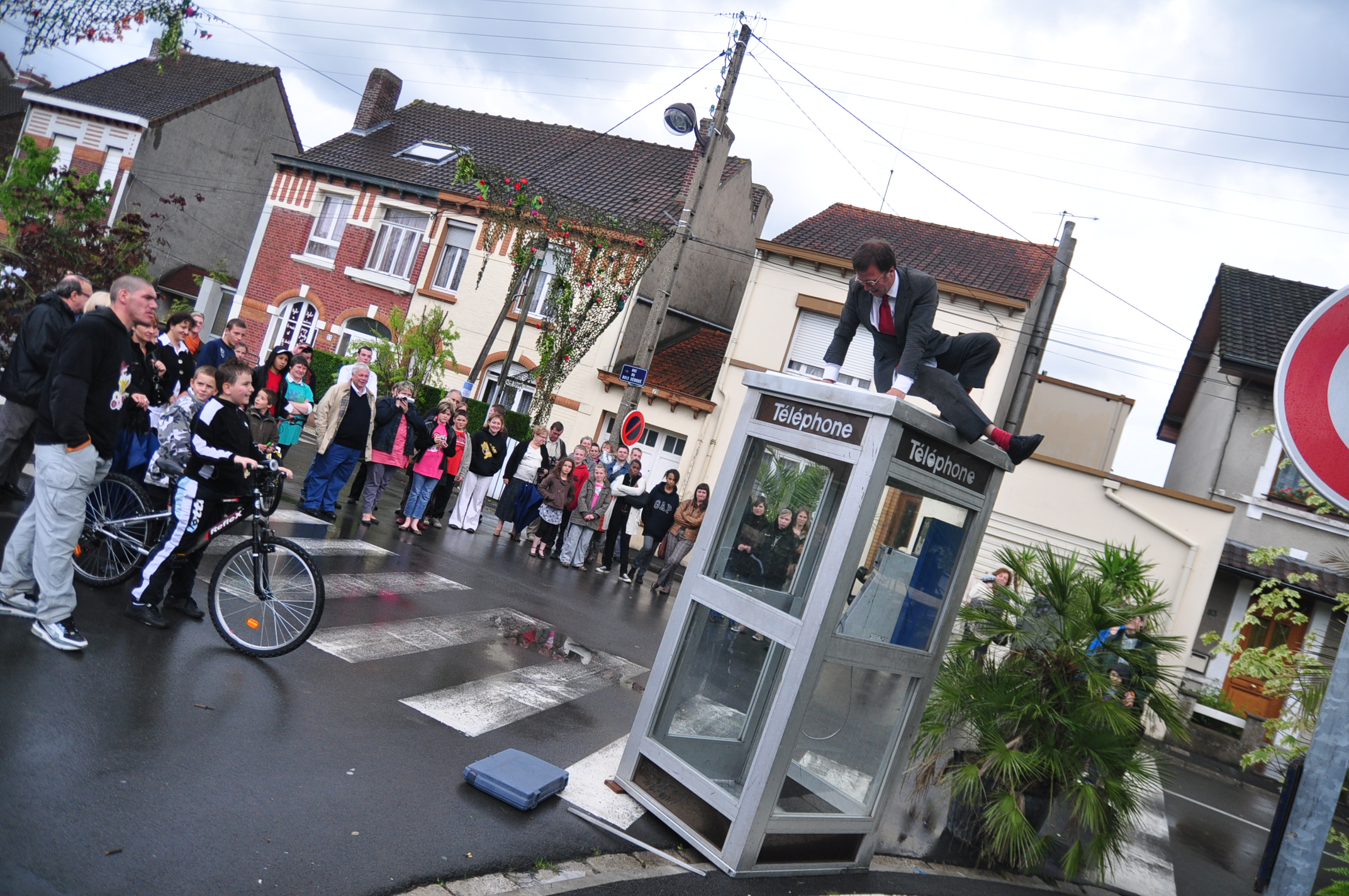 Ivan chary et la compagnie du petit Monsieur à Bethune en 2009